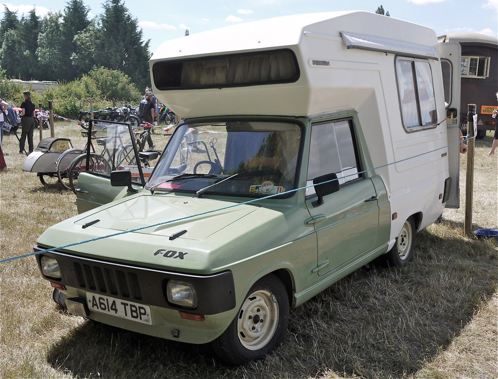 Panasonic G1 14-45 Lens